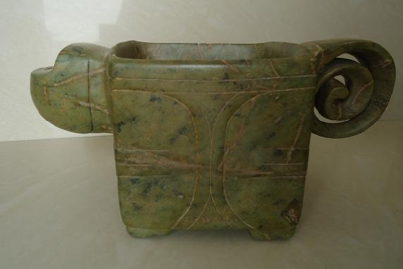 Mortero, Valdivia-Chorrera Costa Sur // 1400 a.C.